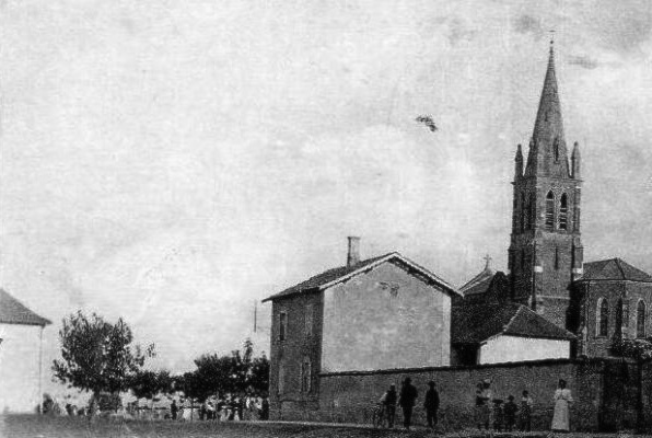 Eglise, Rochetoirin, Isère, France. Photo ancienne.